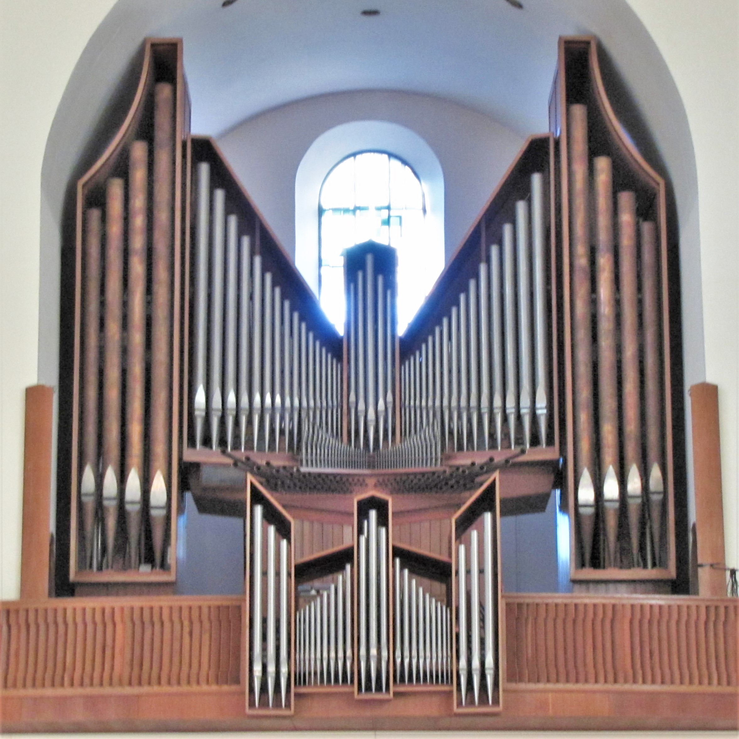 Alsace, Bas-Rhin, Église Sainte-Madeleine de Strasbourg (PA00085028).Orgue Roethinger (1965).